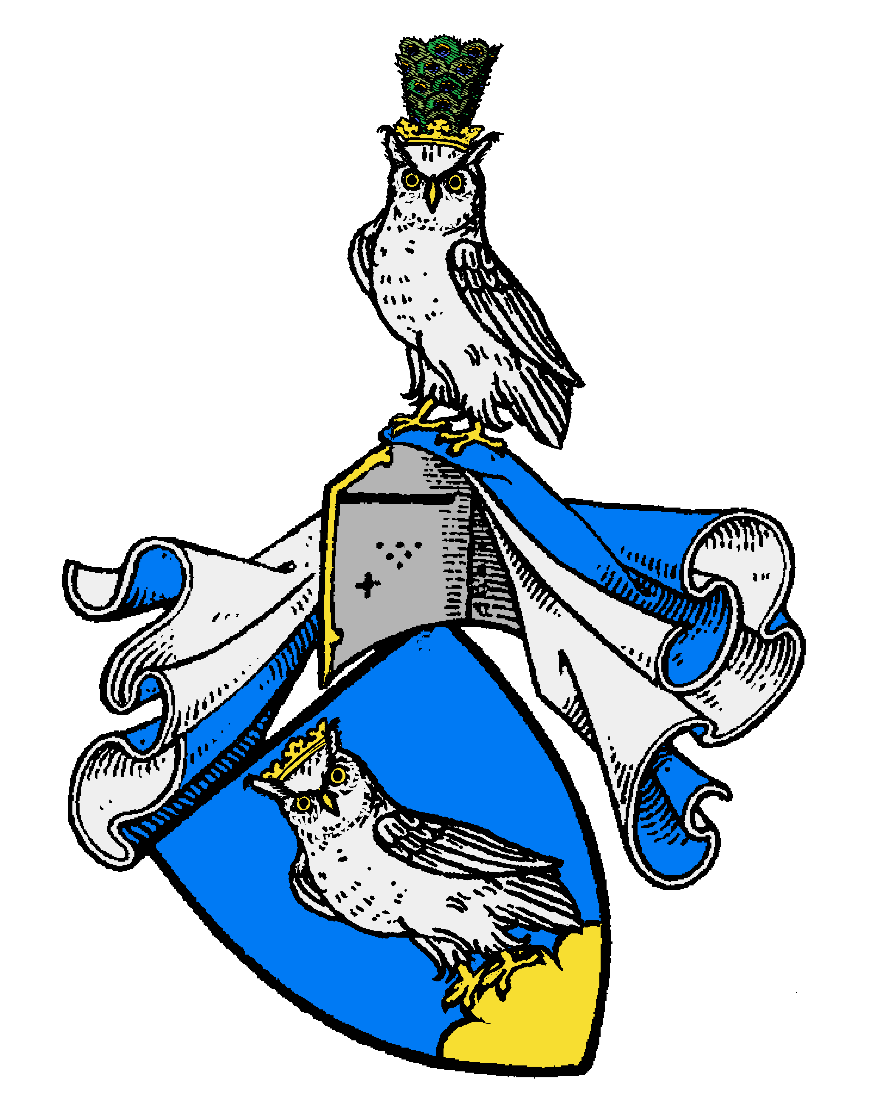 Wappen der von Auffenstein, ursprünglich Ministeriale der Grafen von Tirol. 1173 erstmals erwähnt. Ihr Wappentier war der Uhu, der im Mittelalter Auf hieß.